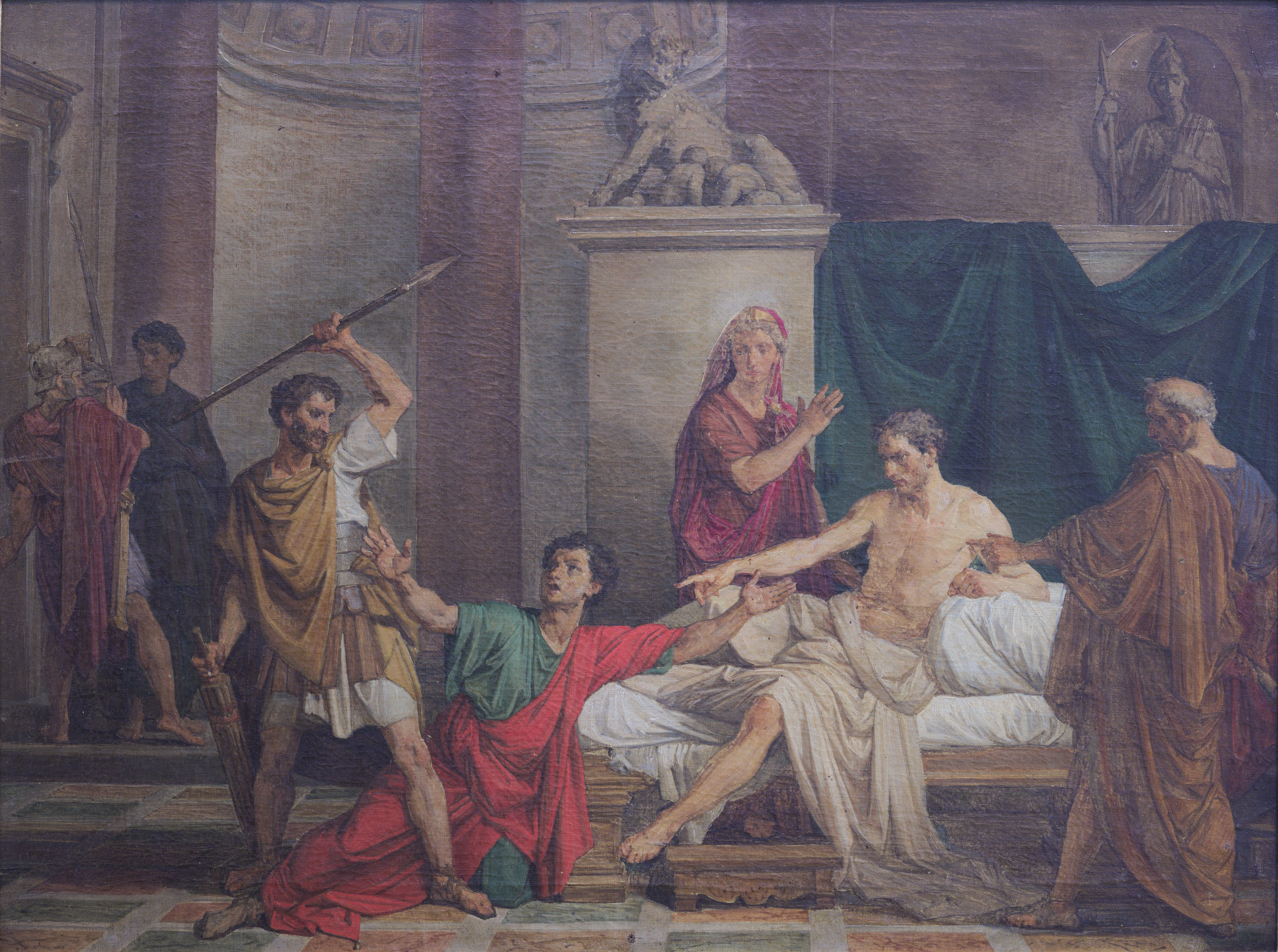 Huile sur toile, non daté.